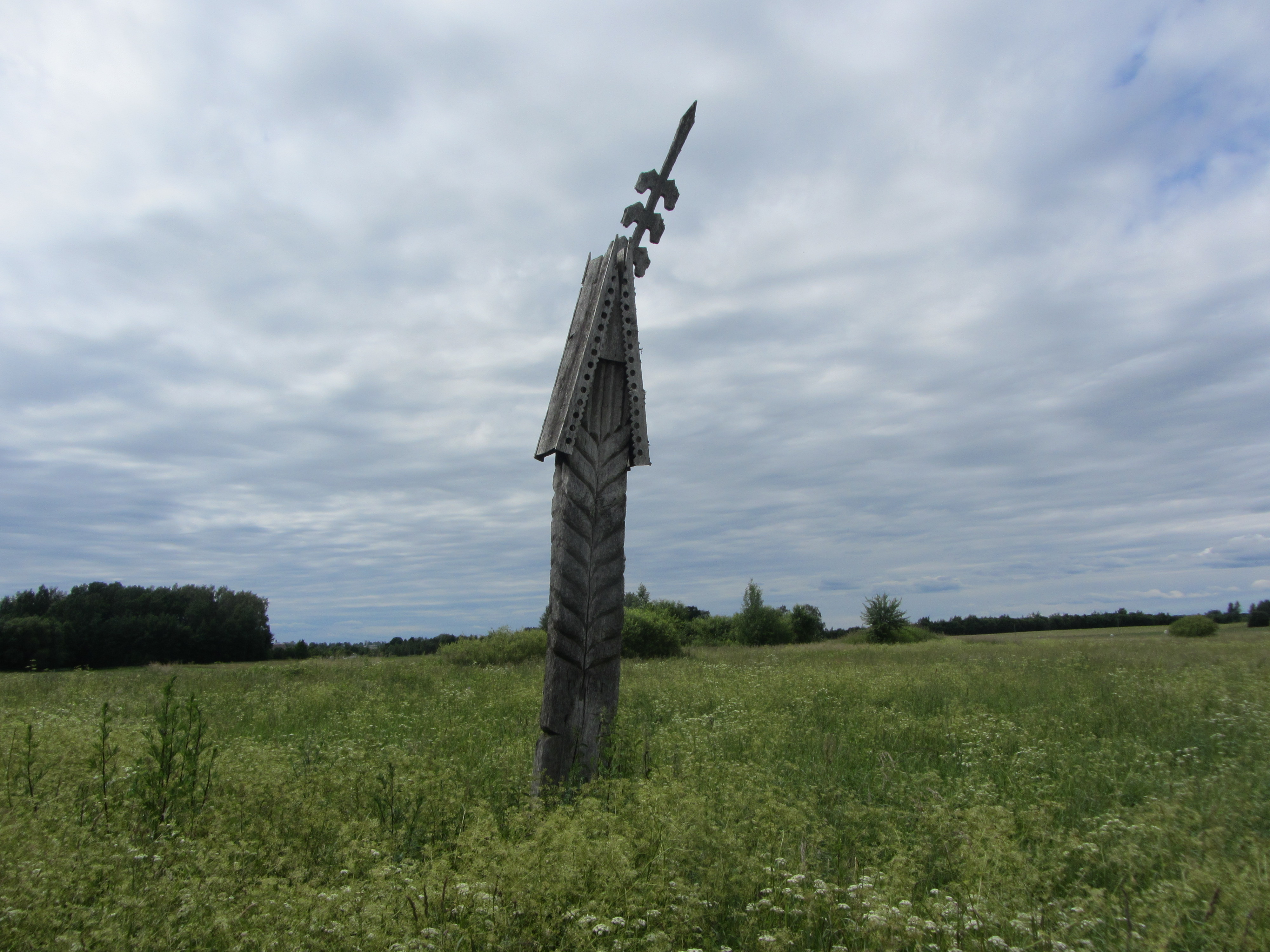 Viršuliškiai 19162, Lithuania